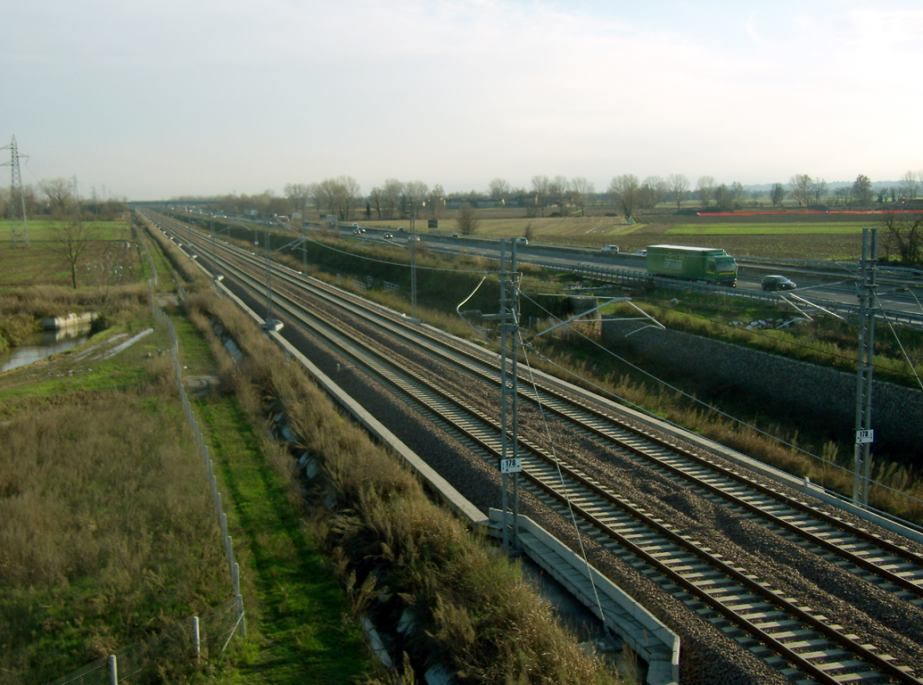 La ferrovia Milano-Bologna ad alta velocità, affiancata all'Autostrada del Sole, nel territorio comunale di Pieve Fissiraga